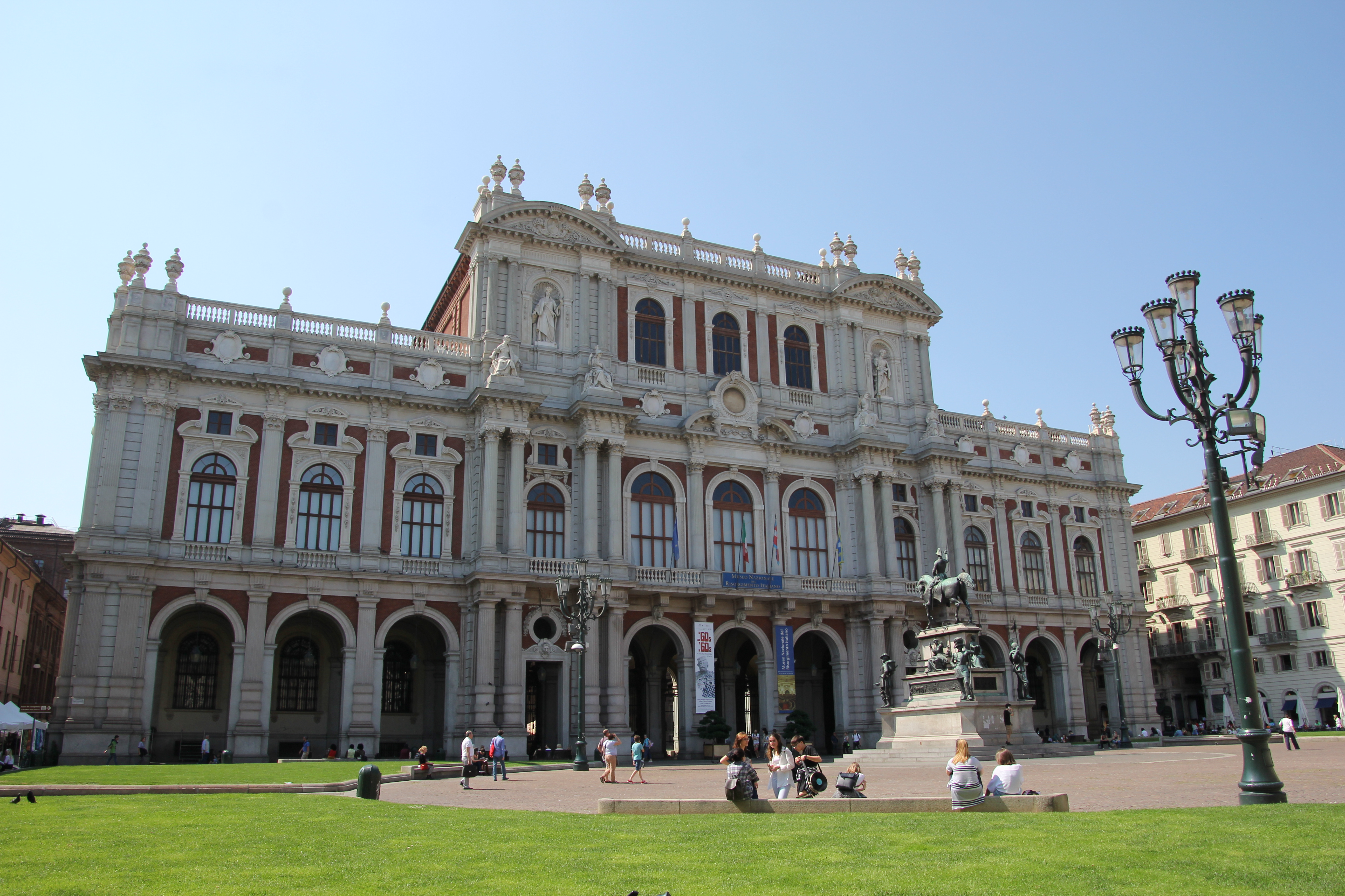 Torino, museo del Risorgimento italiano